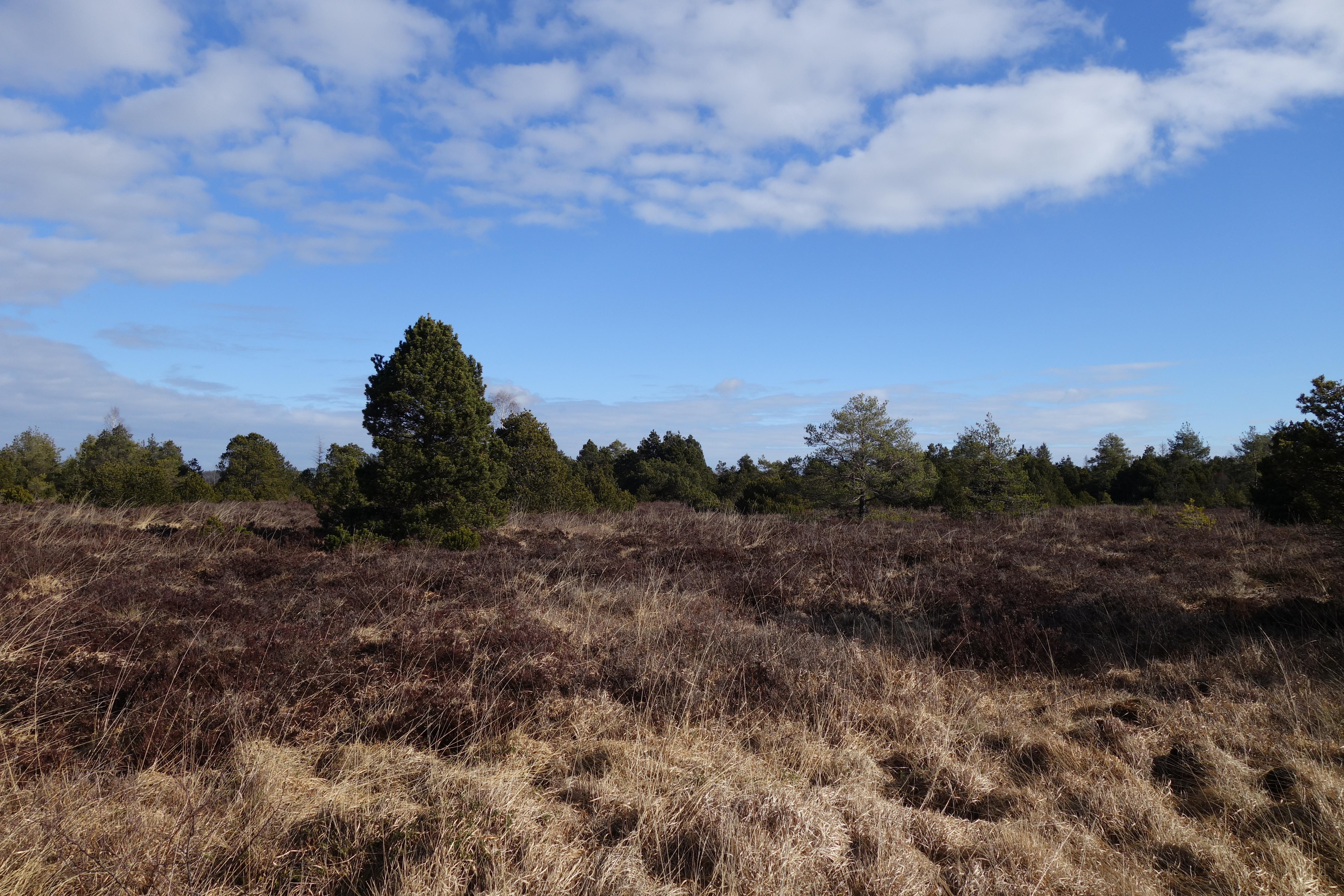 Wurzacher Ried im Bereich der Haidgauer Torfstiche